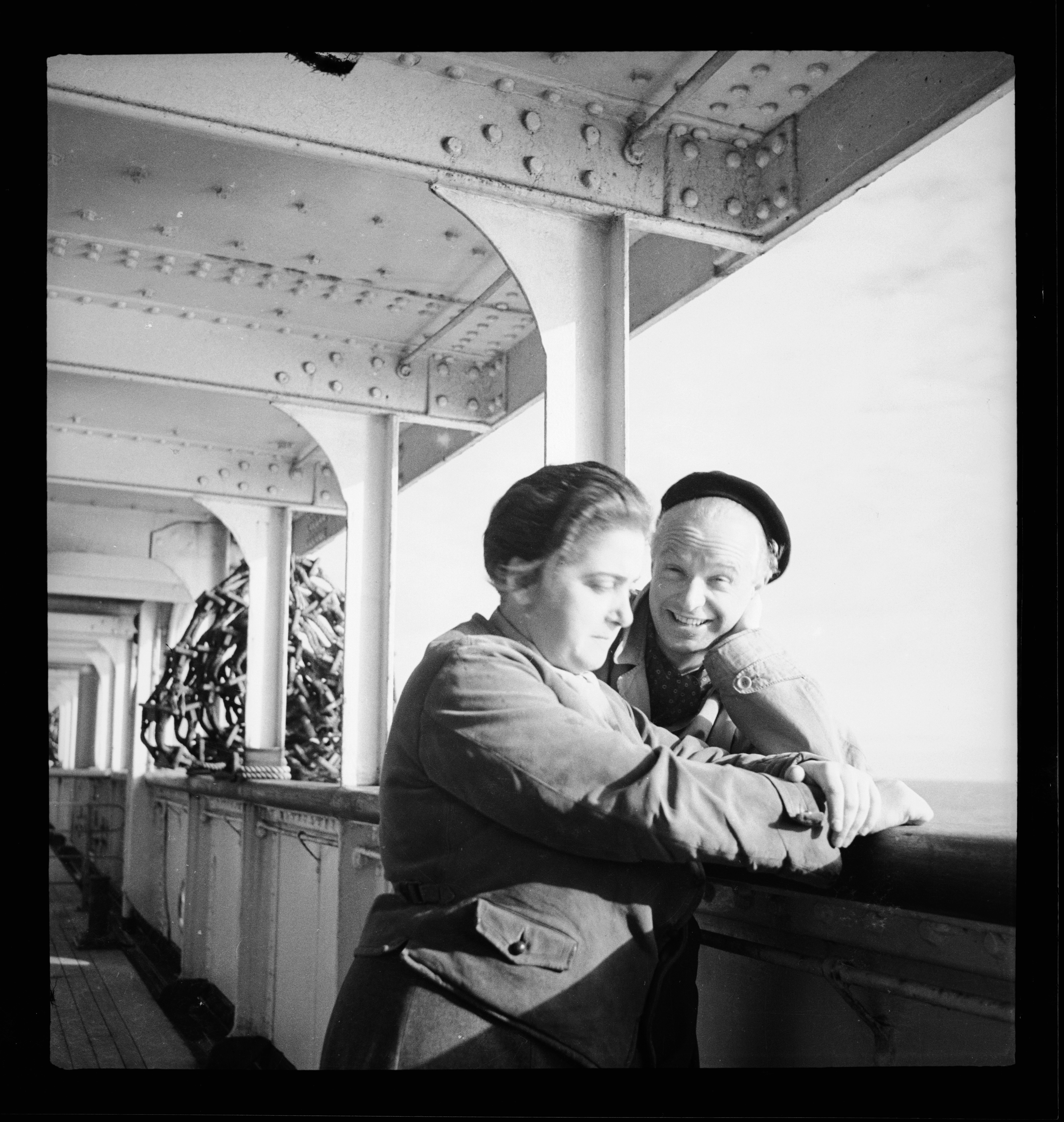 Schiff (Rückfahrt Amerika): Menschen; Therese Giehse und Magnus Henning an der Reling stehend